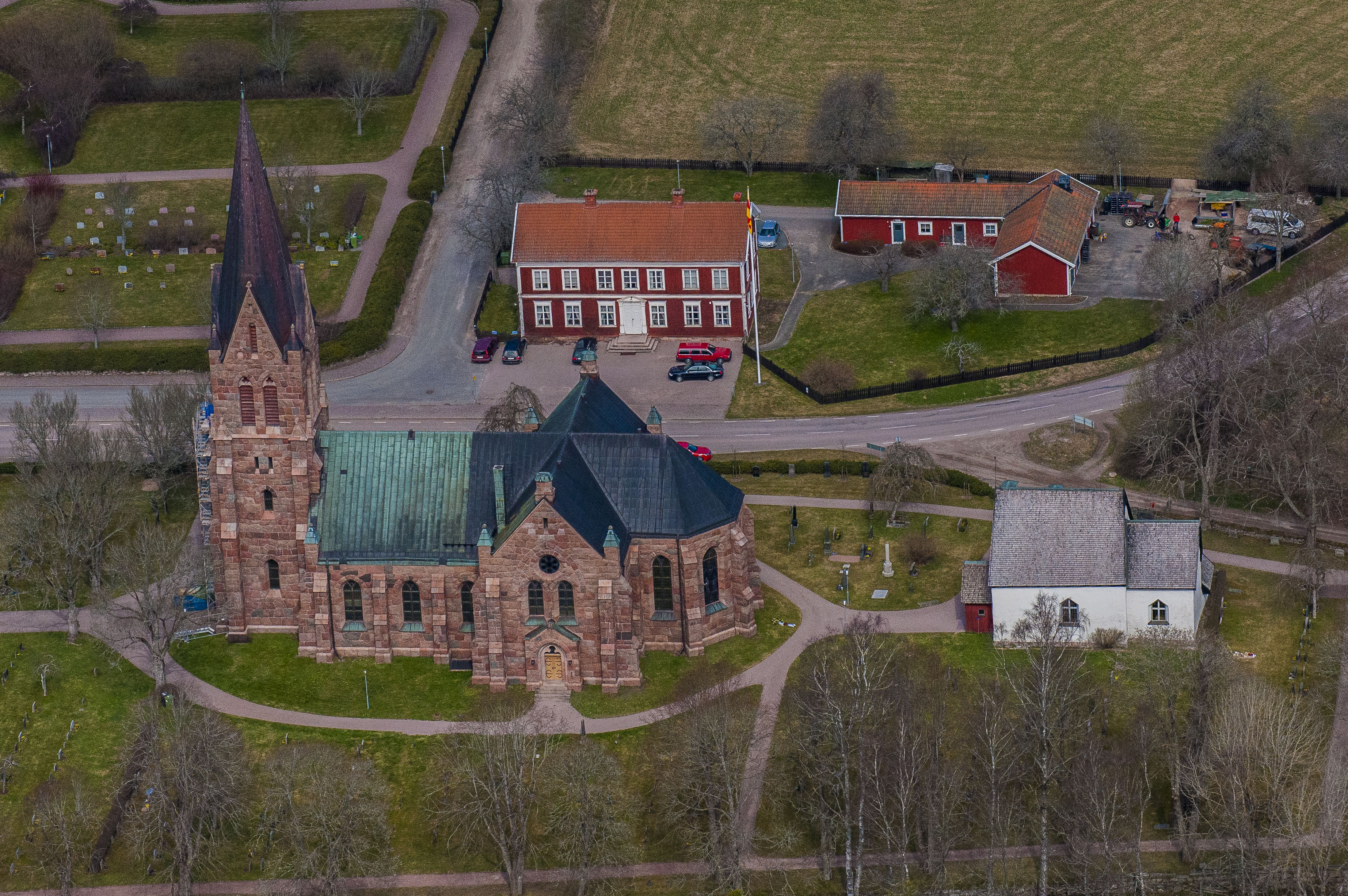 Norra Solberga kyrka